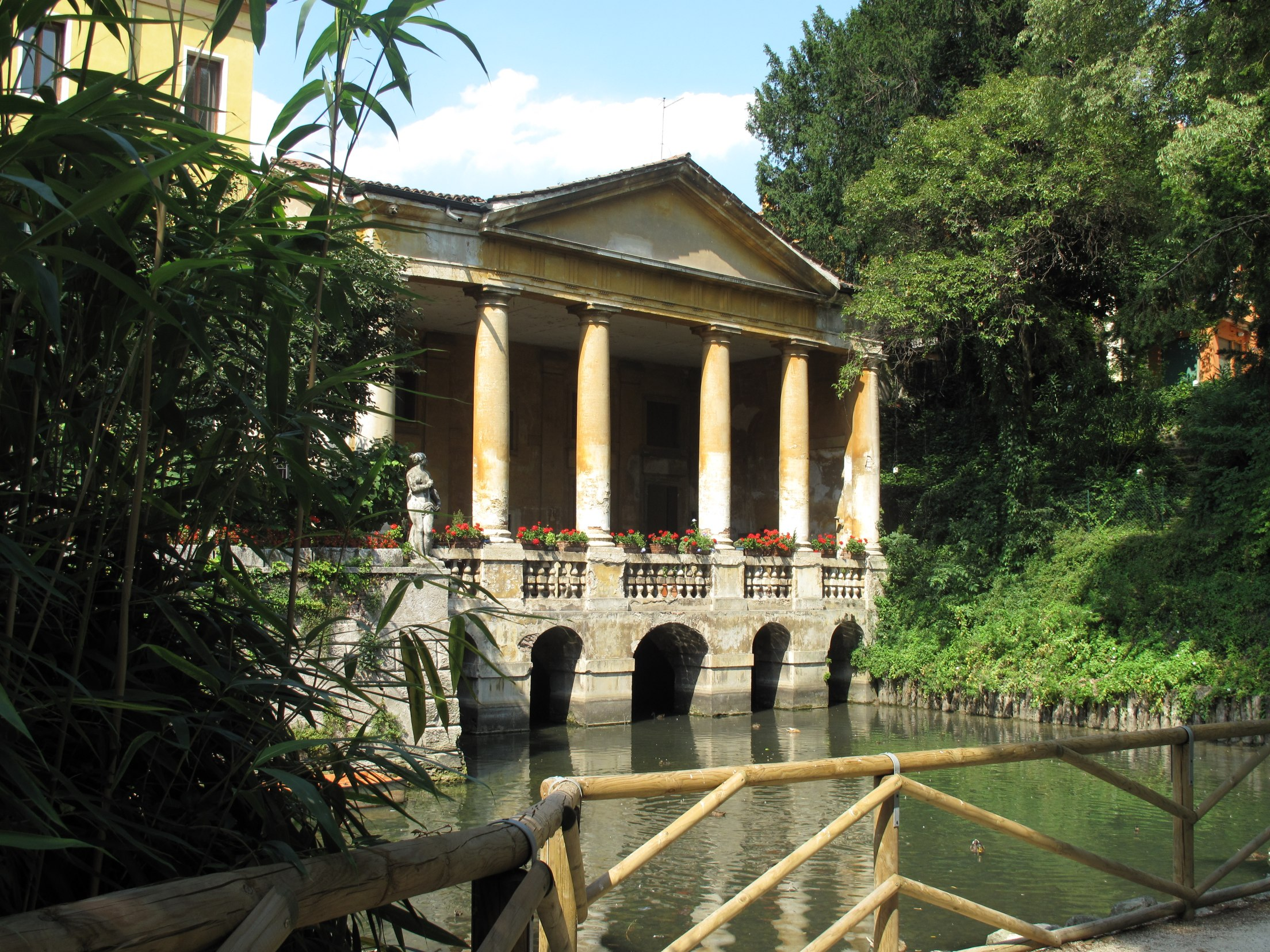 Vicenza 18